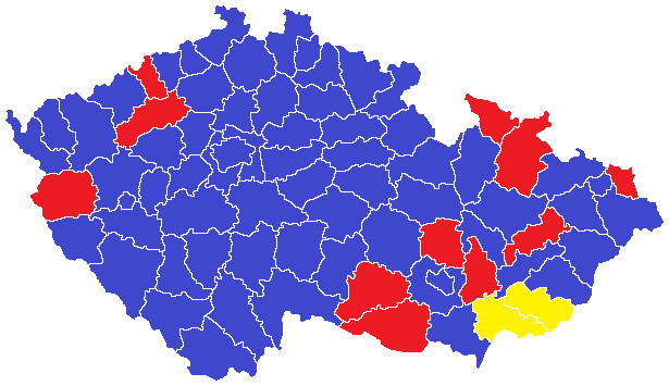 Volby do Evropského parlamentu v roce 2004 - vítězné strany podle okresů (modrá ODS, červená KSČM, žlutá KDU-ČSL)